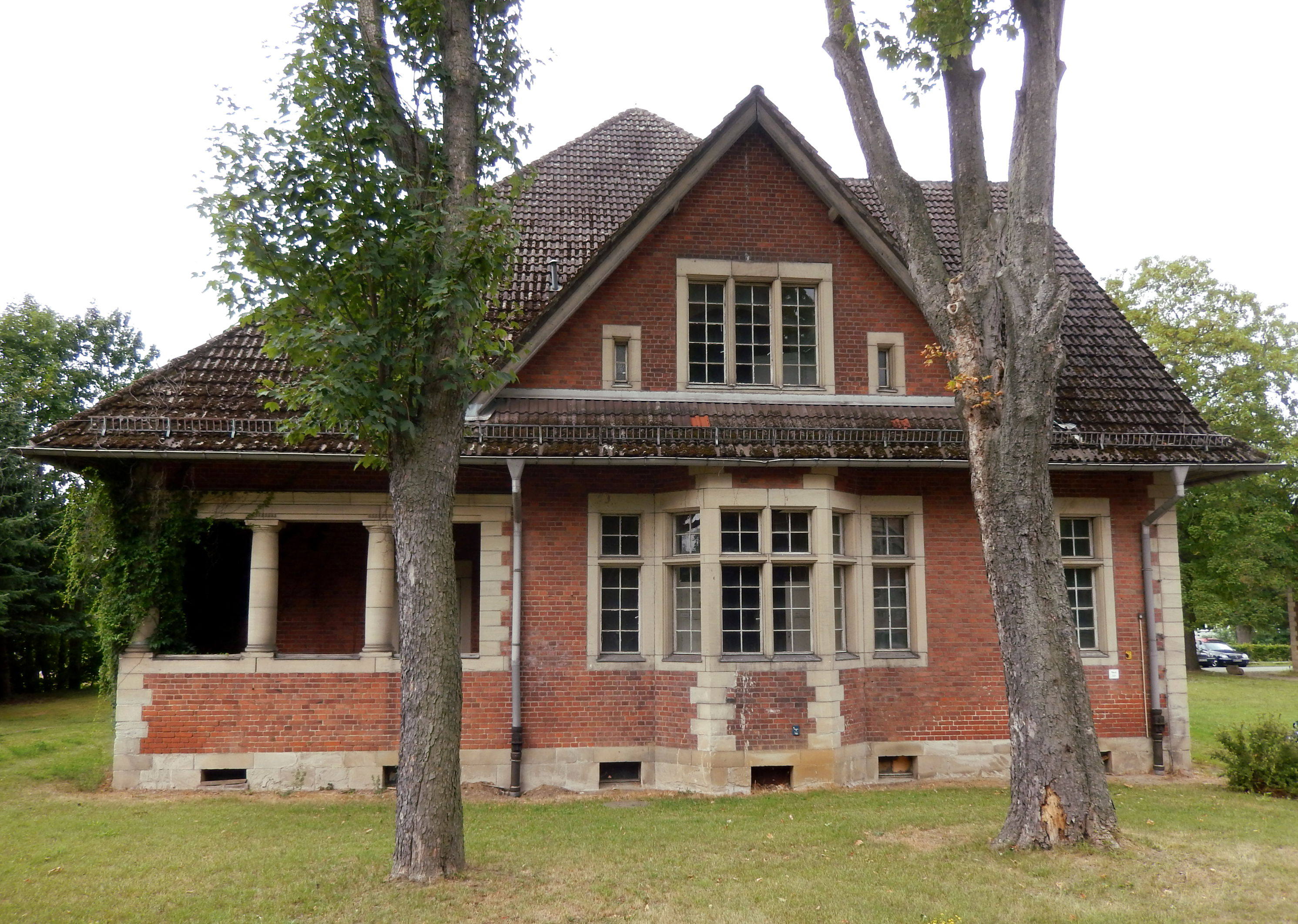 Rückseite des Hauses 231 der Heil- und Pflegeanstalt Buch, 1933 von der SA als Folterstätte und Kaserne genutzt